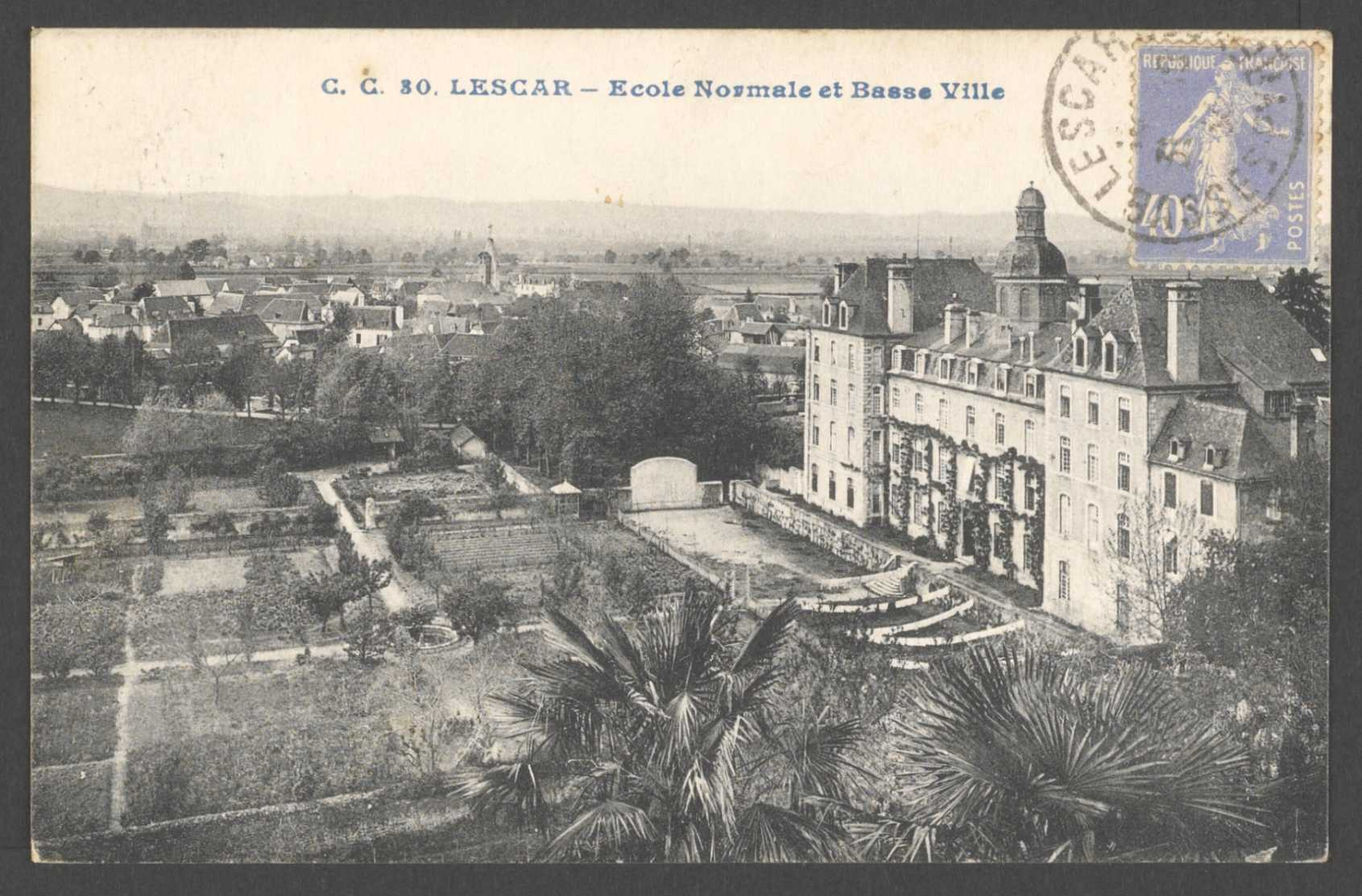 Carte postale illustrant une vue sur l'école normale de Lescar (actuelle Lycée Jacques Monod) ainsi que sur la ville basse vers 1900.